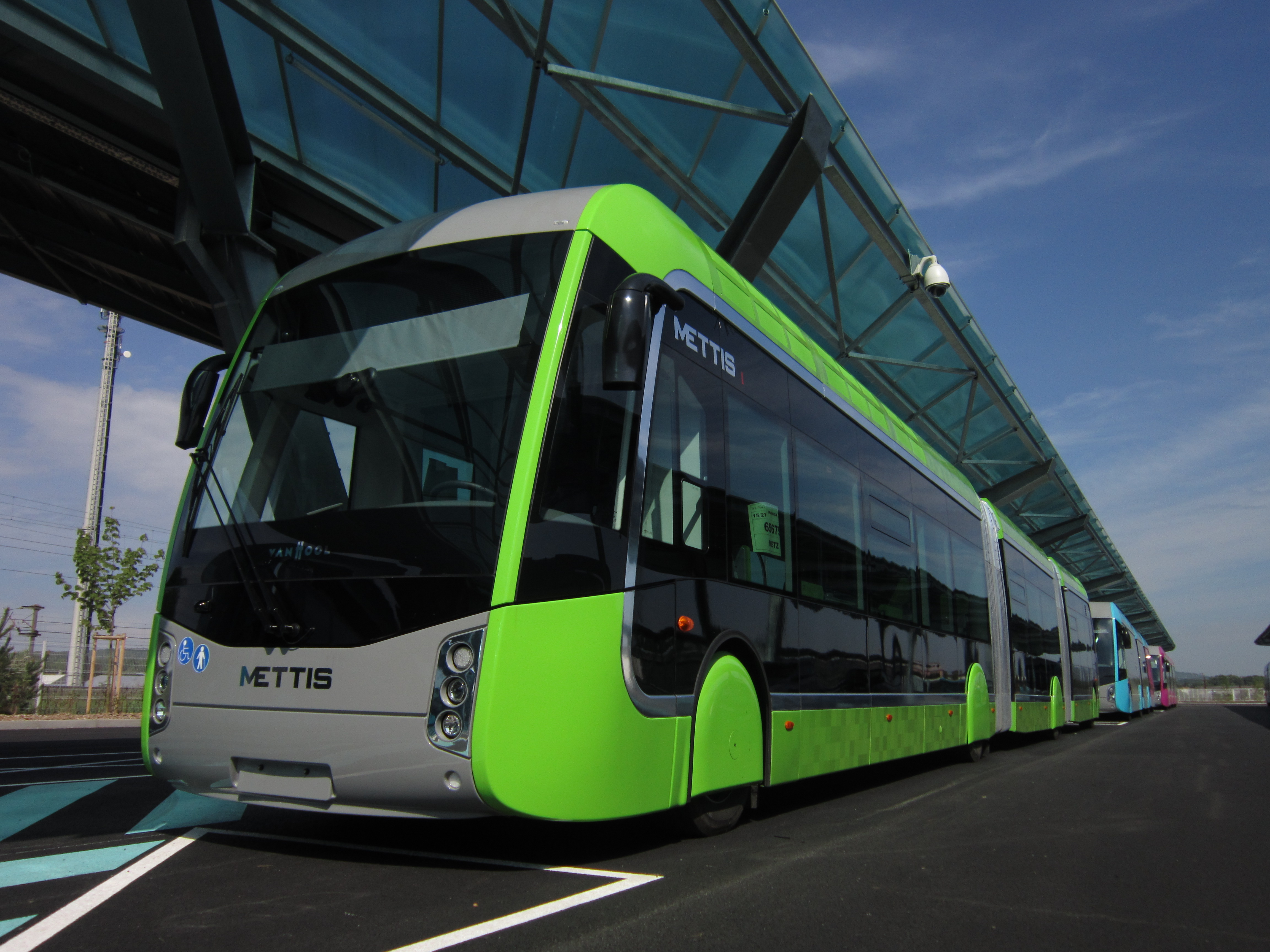 Rangée de bus Van Hool Exquicity 24 stationnés au dépôt du réseau de Metz Métropole.